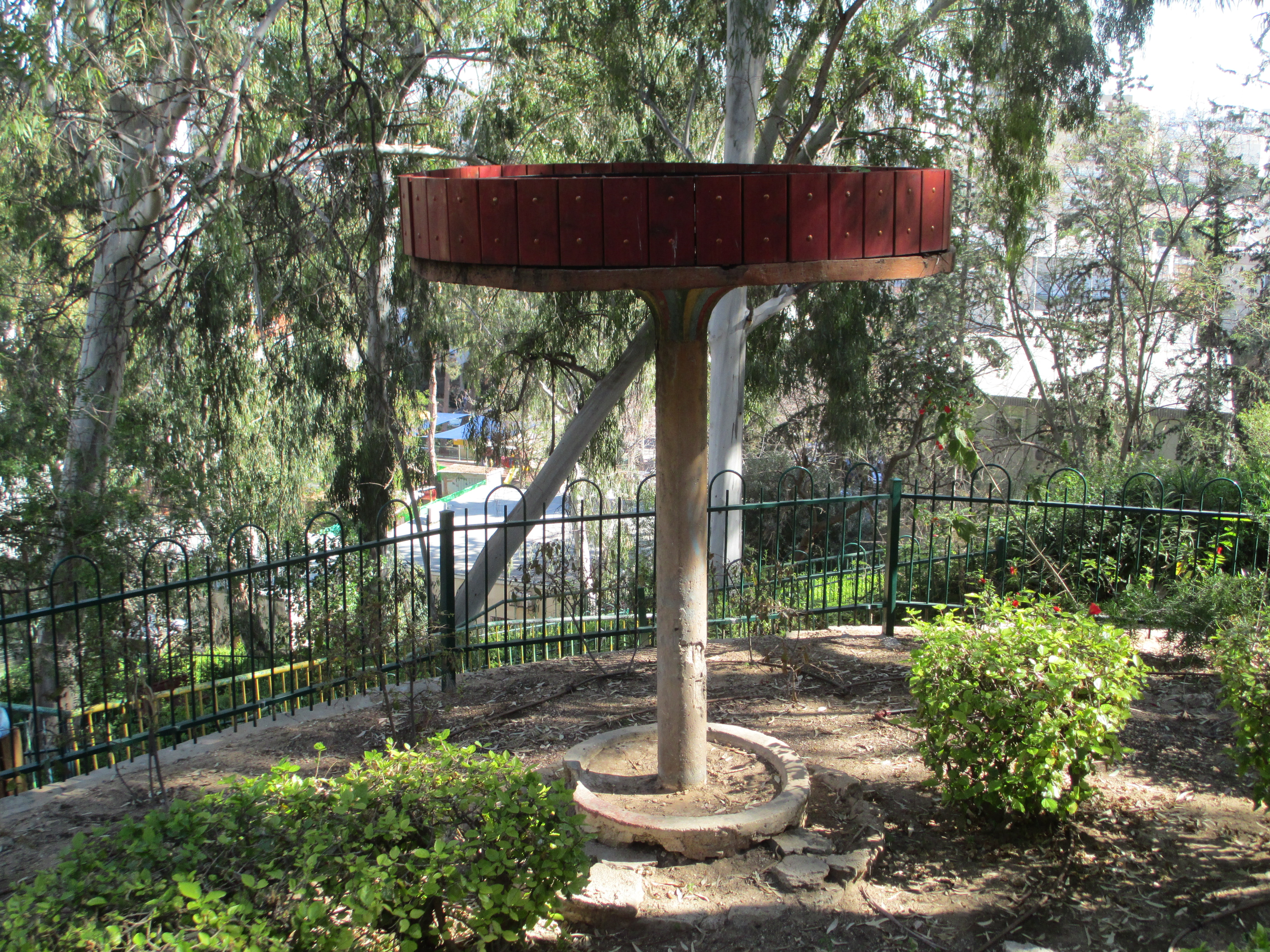 שריד לשובך היונים בגן שאול